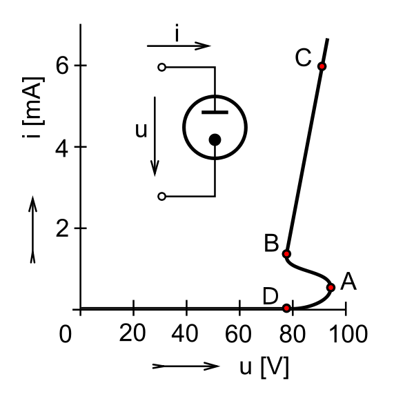 Kennlinie einer Neonlampe